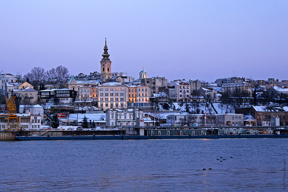 Foto de Luis Filipe Gaspar tirada em Belgrado, Servia